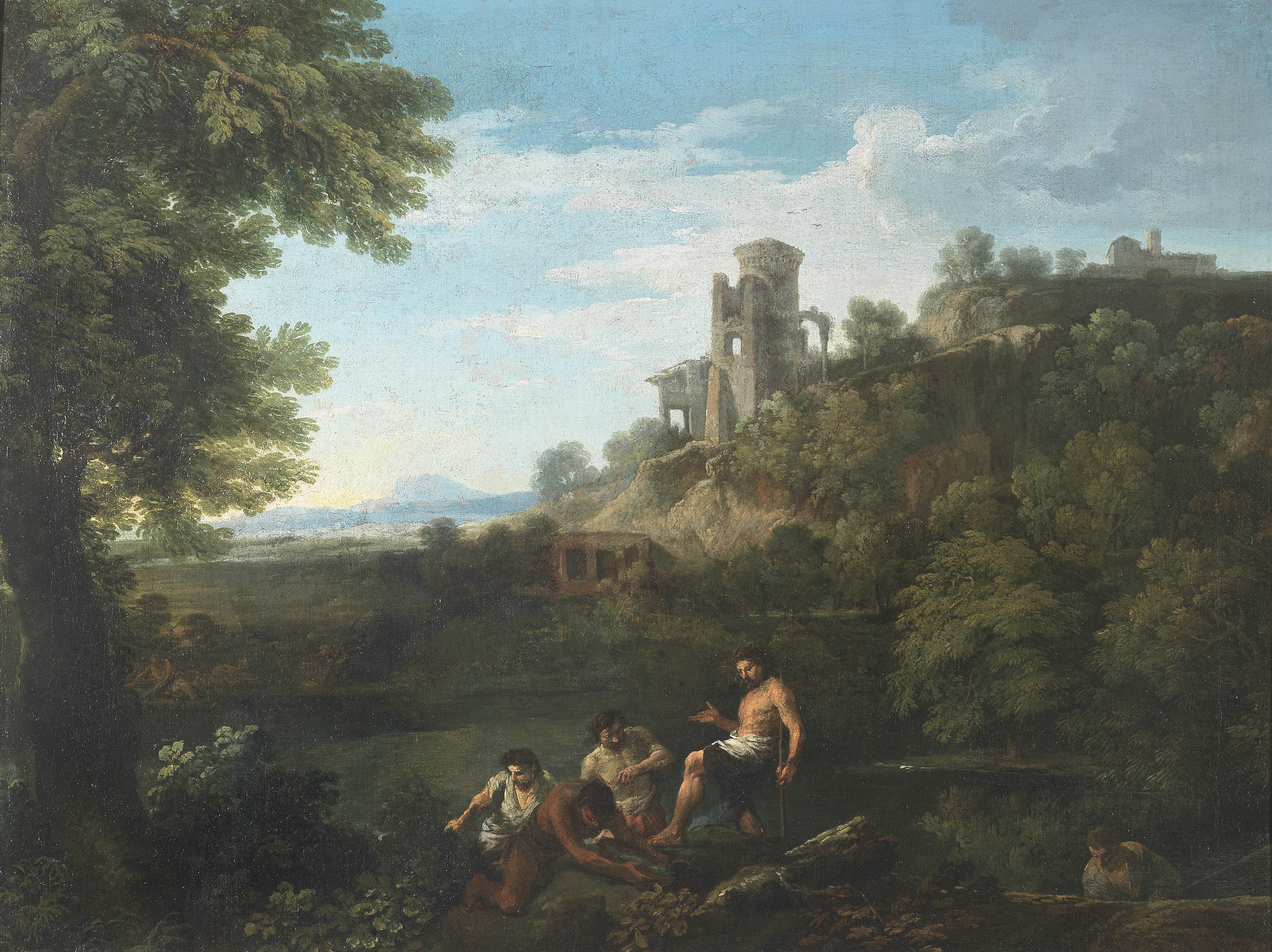 Paesaggio con pescatori ed edifici, Collezione Mainetti (Roma)title QS:P1476,it:"Paesaggio con pescatori ed edifici, Collezione Mainetti (Roma)" label QS:Lit,"Paesaggio con pescatori ed edifici, Collezione Mainetti (Roma)"